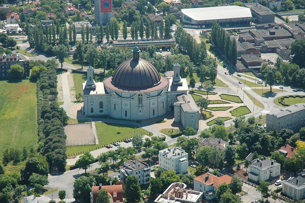 Bazylika p.w. św. Wincentego a'Paulo w Bydgoszczy - zdjęcie o zmierzchu